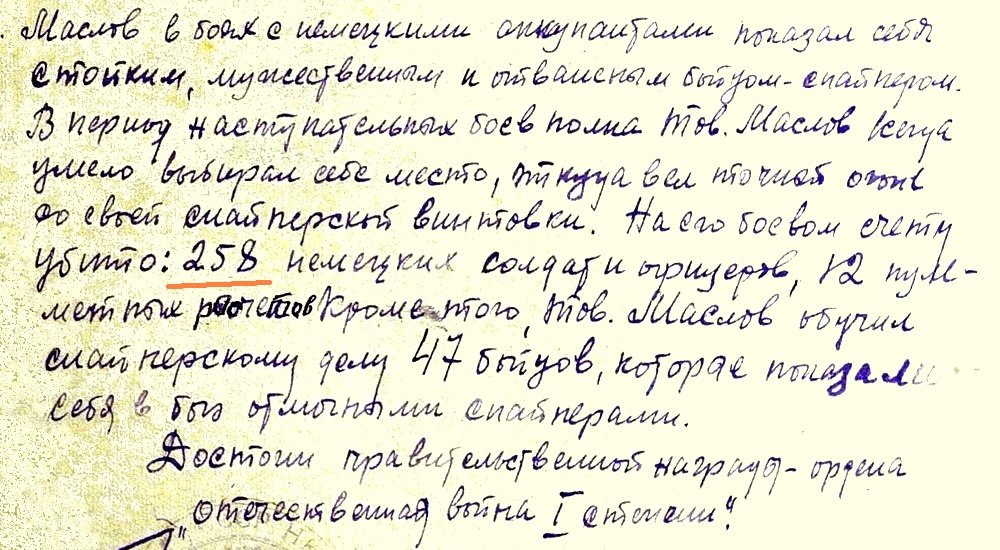 Из материалов наградных листов К. С. Маслова